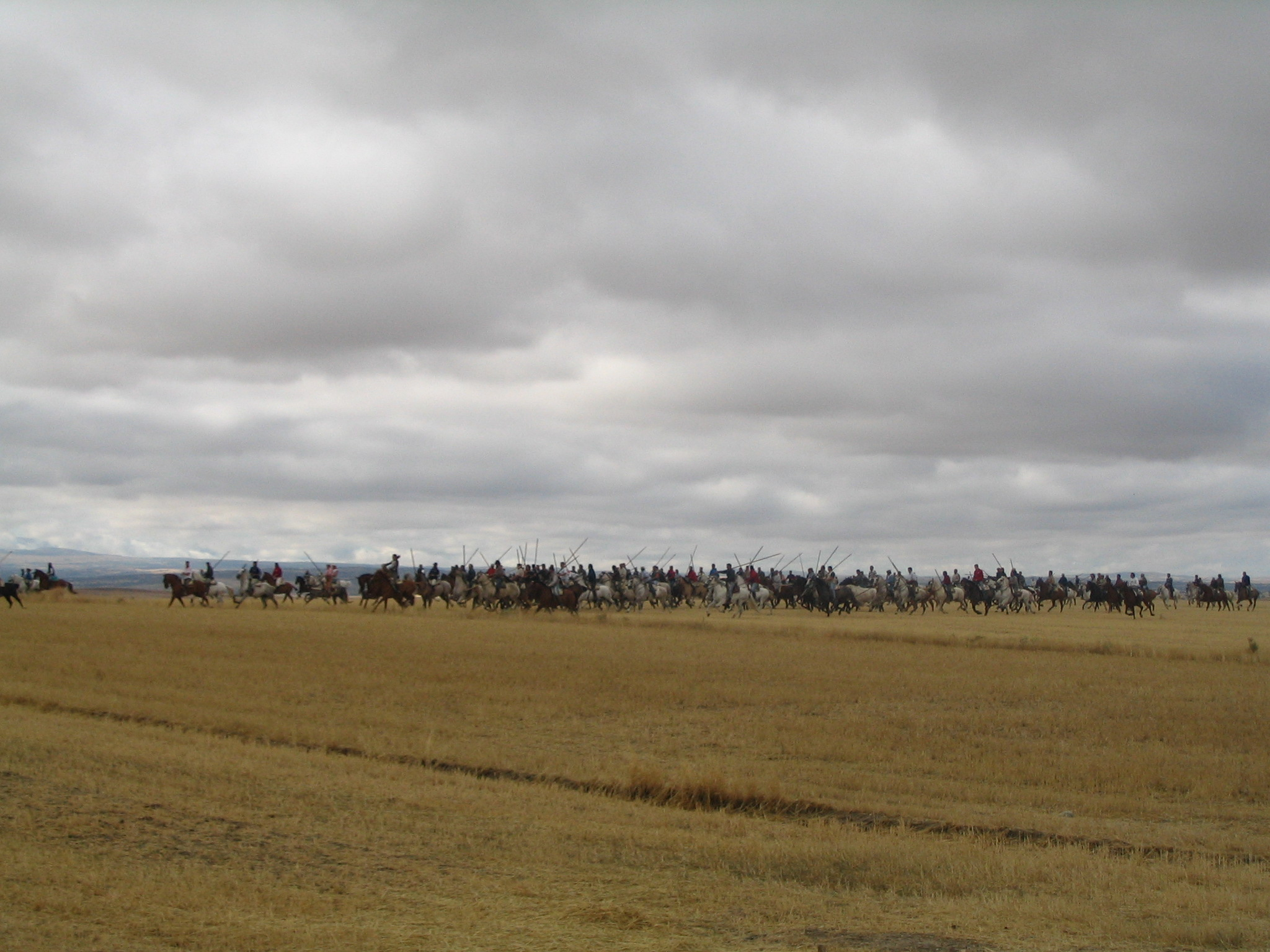 Encierro a caballo en Macotera 19/08/2006